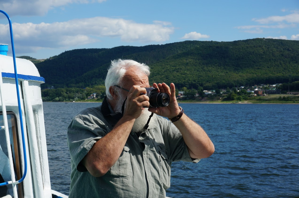 Юрий Рощевский фотографирует Жигулёвские горы с борта теплохода.